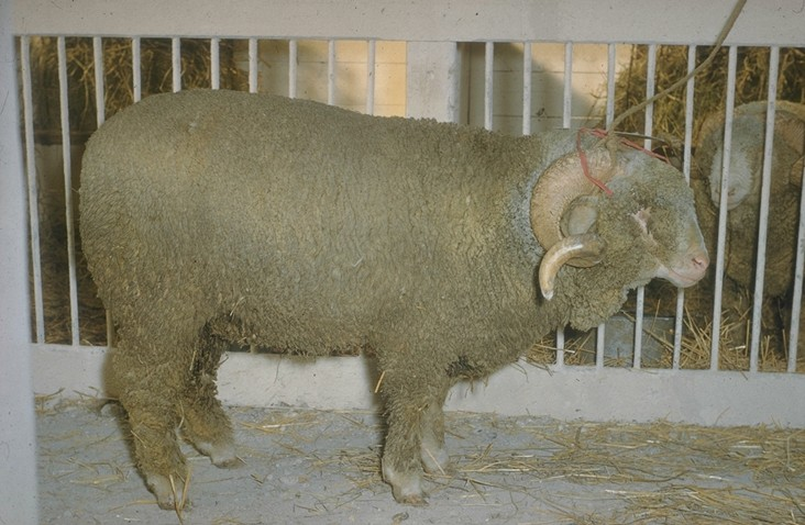 Bélier Mérinos Précoce Salon de l'Agriculture de Paris 1962